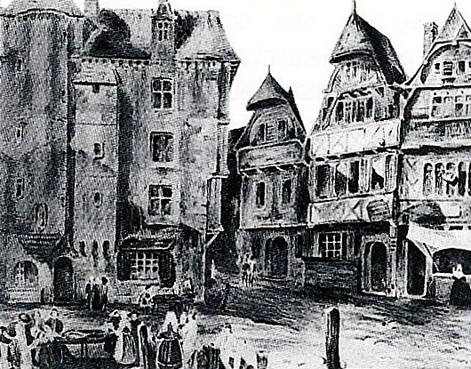 Landerneau : vieilles maisons sur la place du marché (dessin de 1748, auteur inconnu)